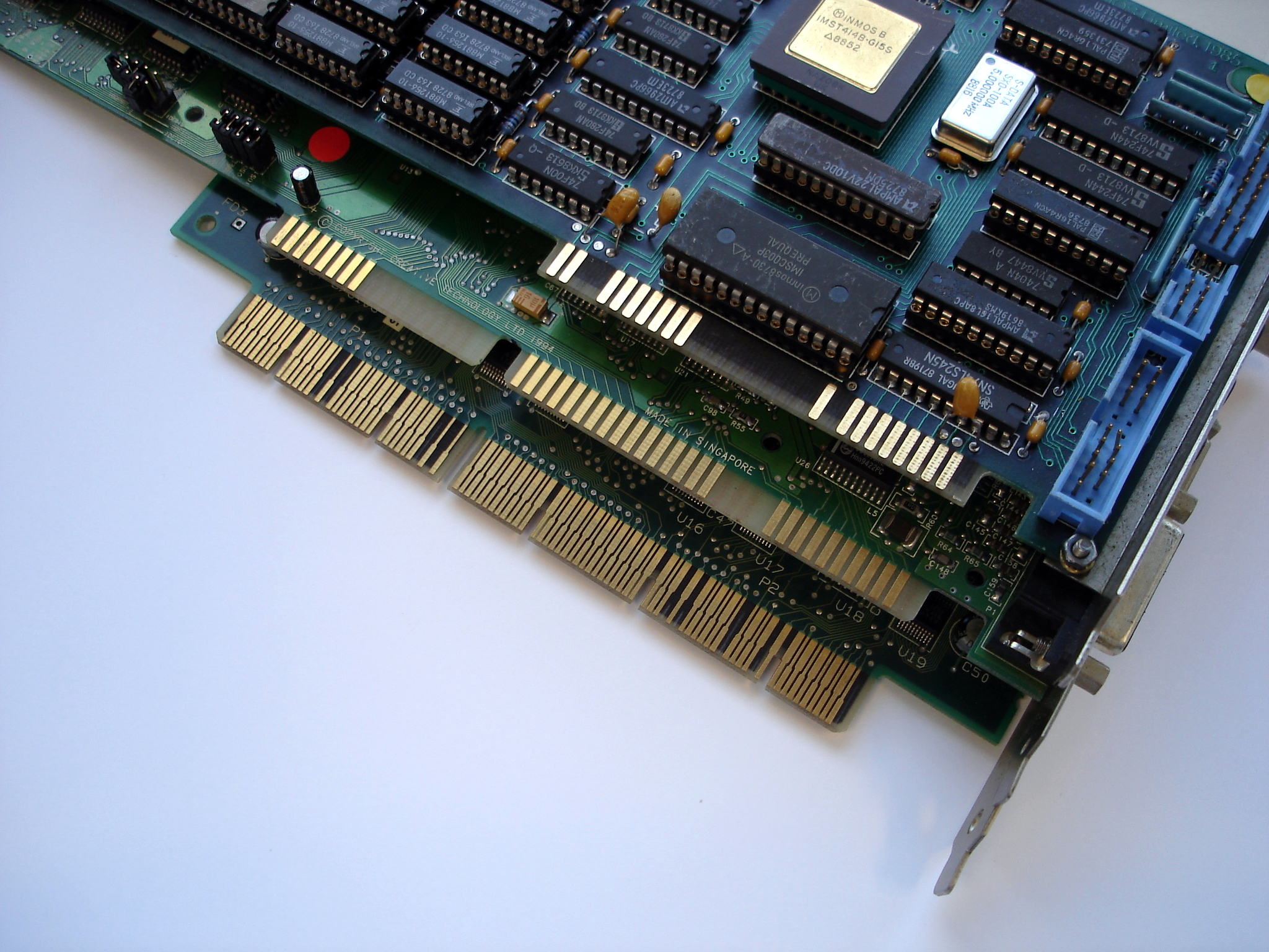 Verschiedene PC-Bussysteme, die aufeinander aufbauen: 8Bit-Bus des XT, 16Bit-Bus ISA, 32Bit-Bus Extended ISA (EISA)